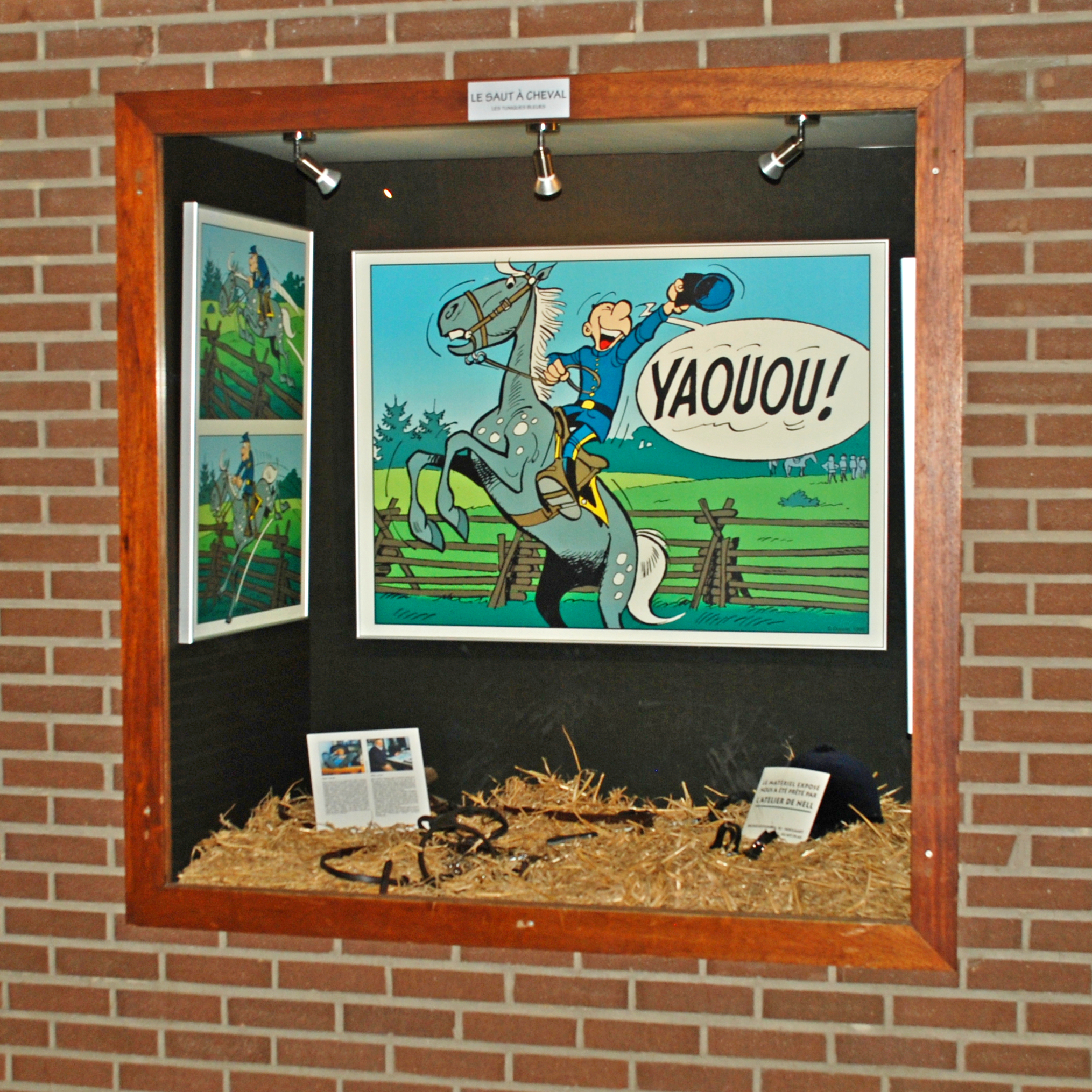 Belgique - Louvain-la-Neuve - Centre sportif de Blocry : Saut à cheval / Tuniques Bleues